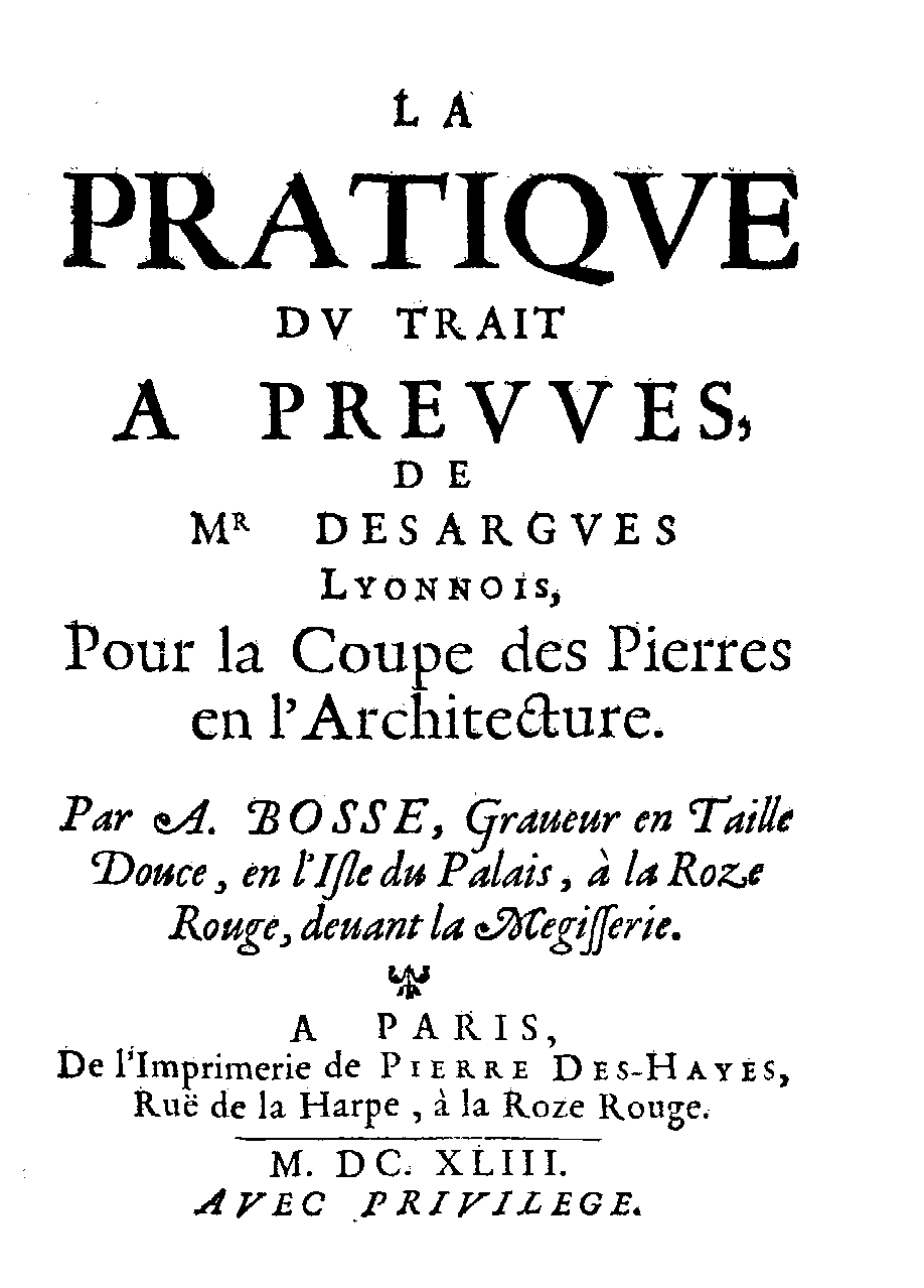 La pratique du trait a preuues de Mr Desargues Lyonnois, pour la coupe des pierres en l'architecture. Par A. Bosse, graueur en taille douce, .... - A Paris : de l'imprimerie de Pierre Des-Hayes, rue de la Harpe, a la Roze Rouge, 1643. - [12], 56, [116] p., 114 p. di tav. : ill. ; 8º .